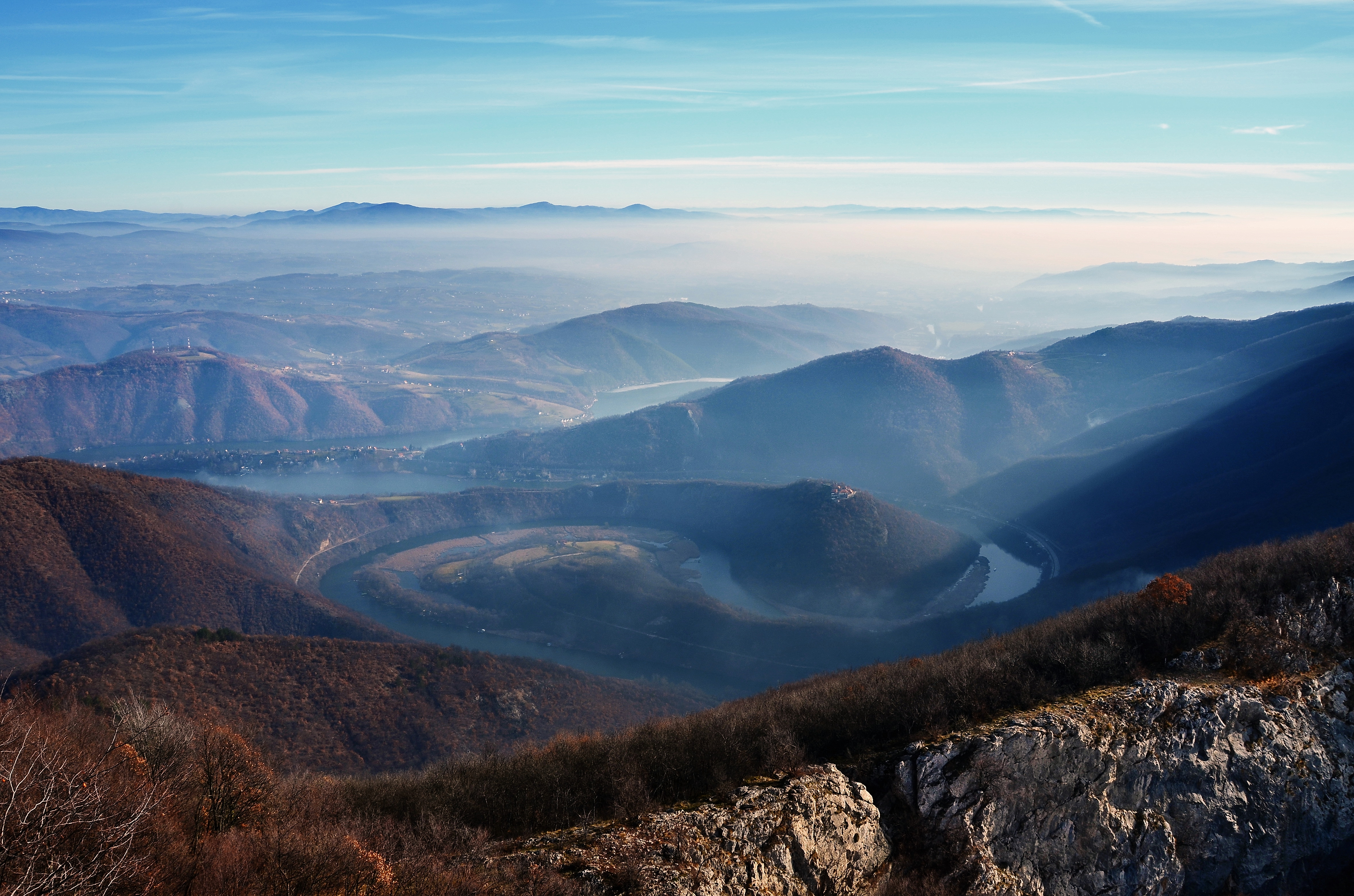 Srpskohrvatski / српскохрватски: Ово је фотографија заштићеног природног добра у Србији под шифром: ПИО11 This is a a photo of a natural area in Serbia with ID: ПИО11 Fotografija uklještenih meandri Zapadne Morave je snimljena sa vrha Kablara koji sa planinom Ovčar formira Ovčarsko – kablarsku klisuru.